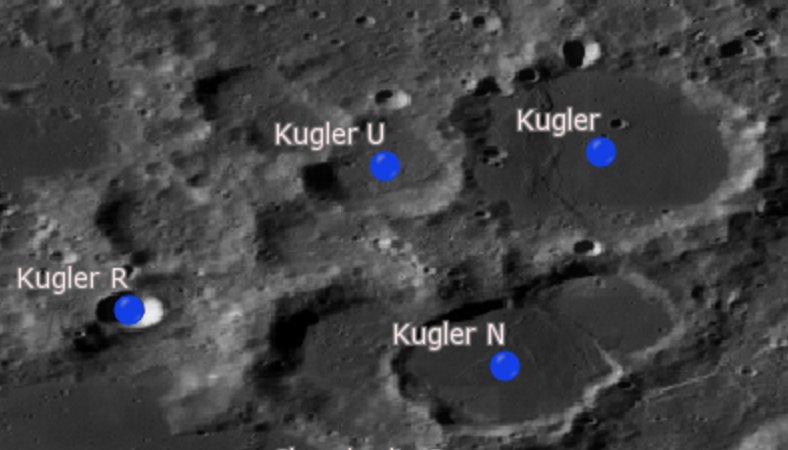 Cráter lunar Kugler. Cráteres satélite. (Imagen LRO)